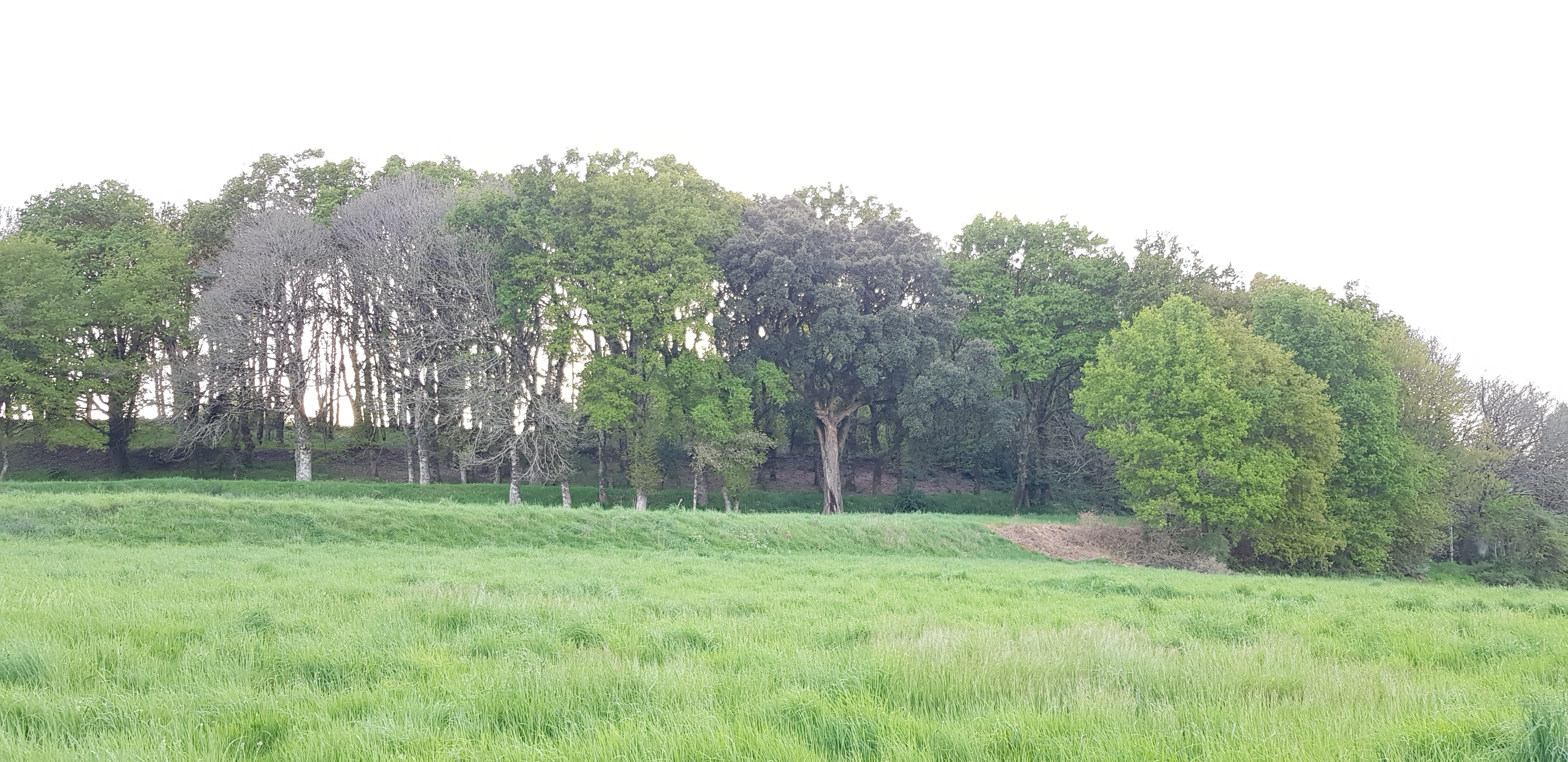 Monte do Agro, en Carracedo (Soutolongo, Lalín).